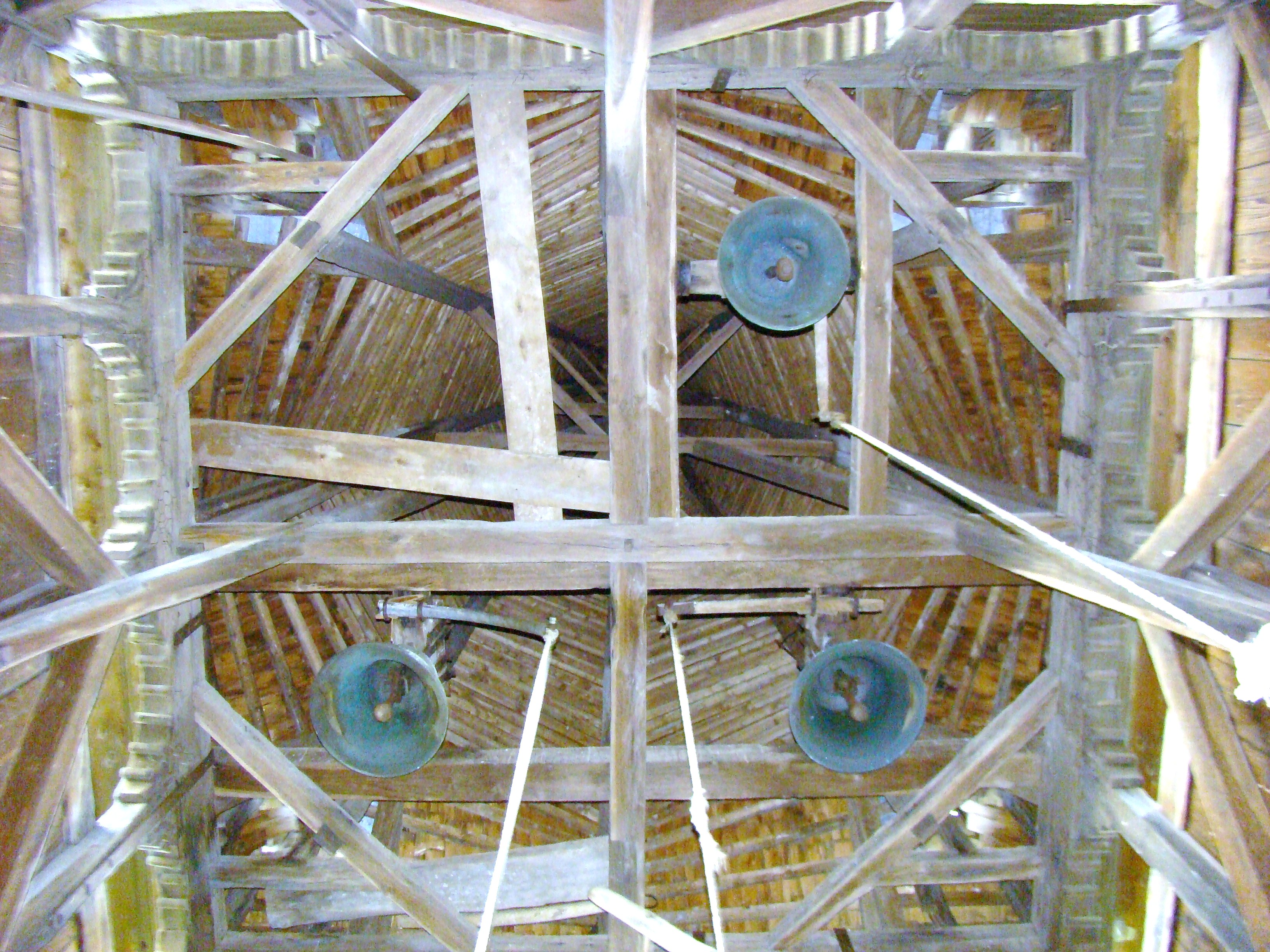 Biserica de lemn "Sfinții Arhangheli Mihail şi Gavril", sat PLOPIŞ; comuna ŞIŞEŞTI